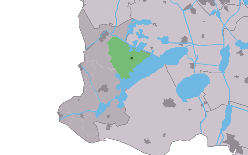 Kaartsje fan himrik fan It_Heidenskip